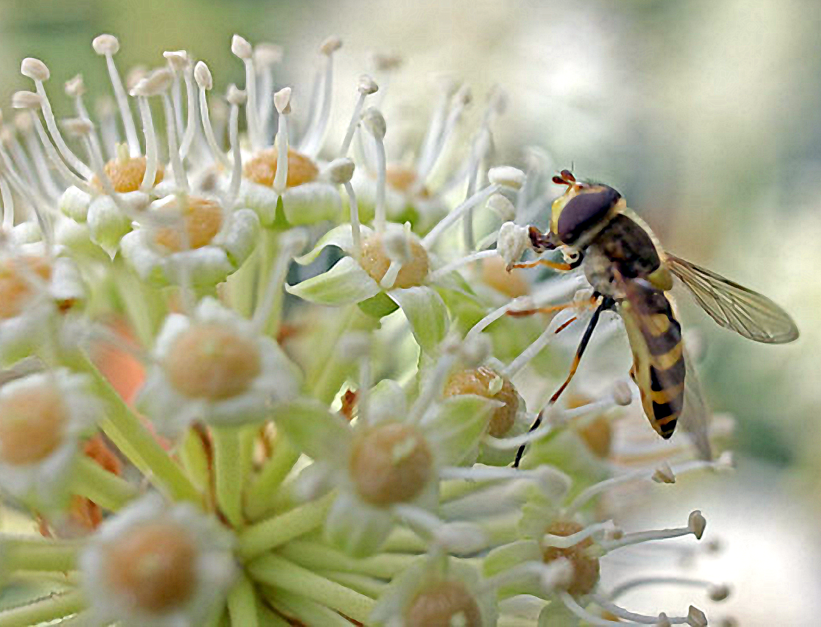 Fatsia japonica (Aralia )- Umbela: detalle de las flores. La avispa da la escala.